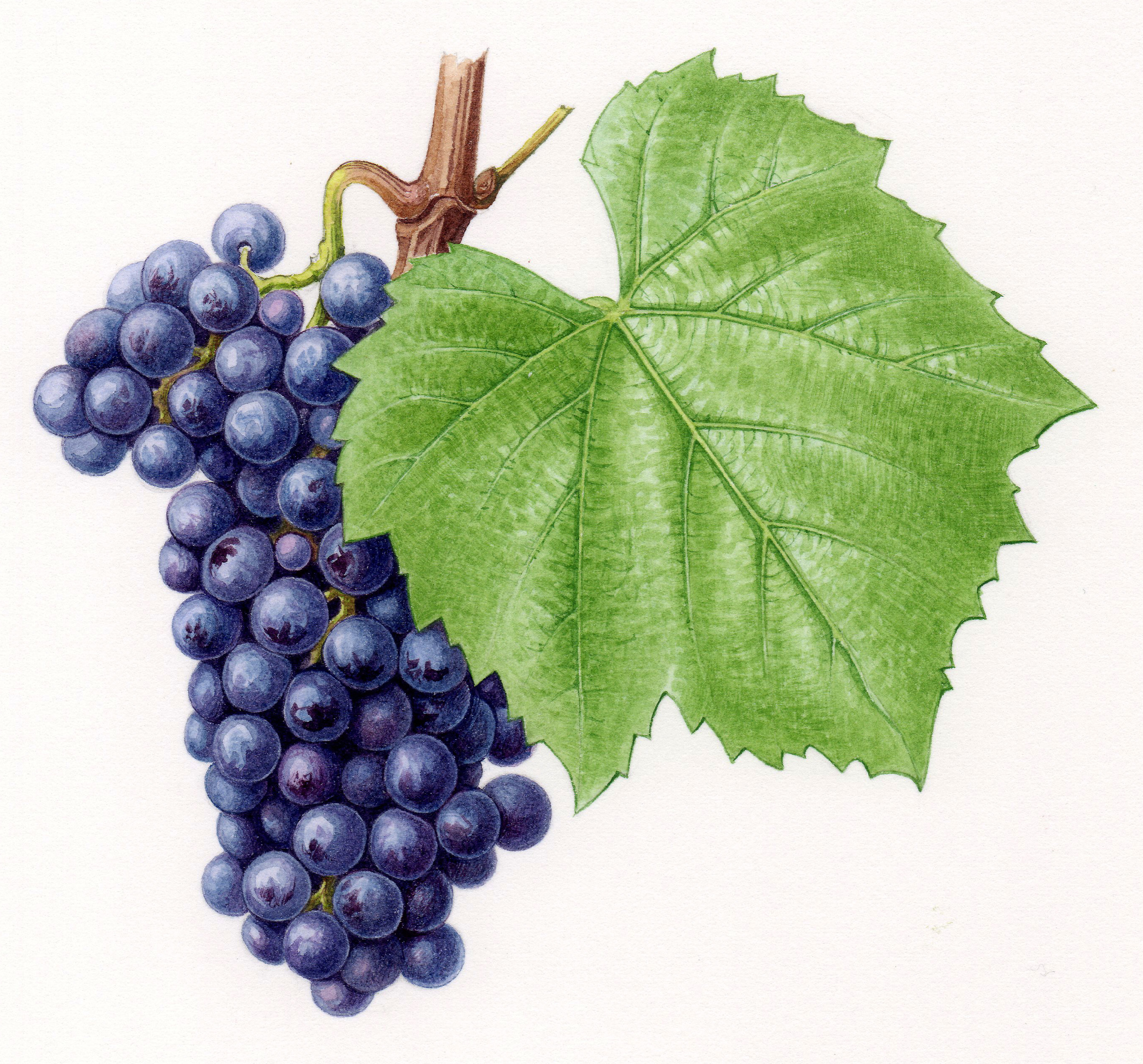 Aquarelles originales pour le Cépages de France (2001)